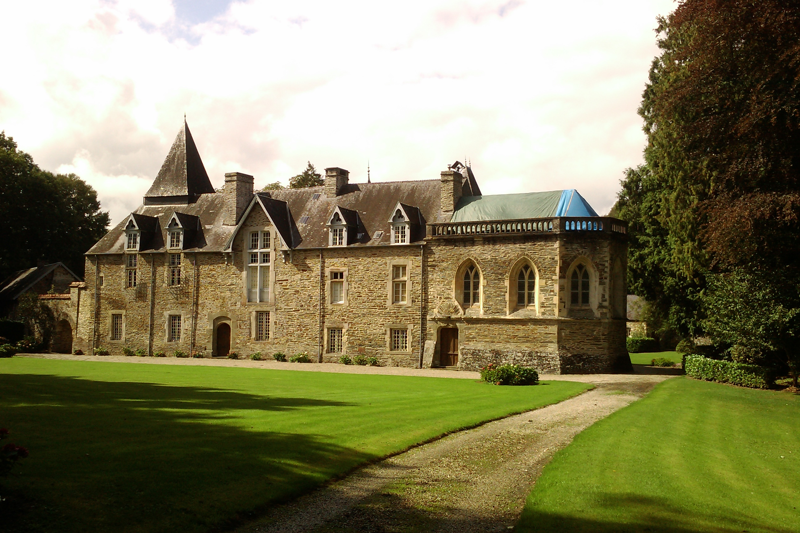 Château de la Vaucelle à Saint-Lô